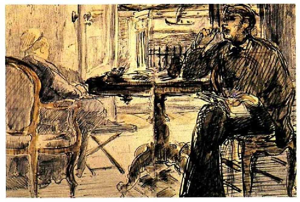 Eduard Maneten zirriborroa. Margolariek zirriborroak egiten dituzte beren koadroak margotzeko prestalan gisa.